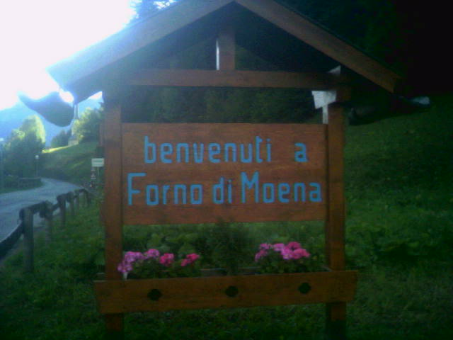 Cartello di entrata del paese di Forno di Fiemme (frazione di Moena)